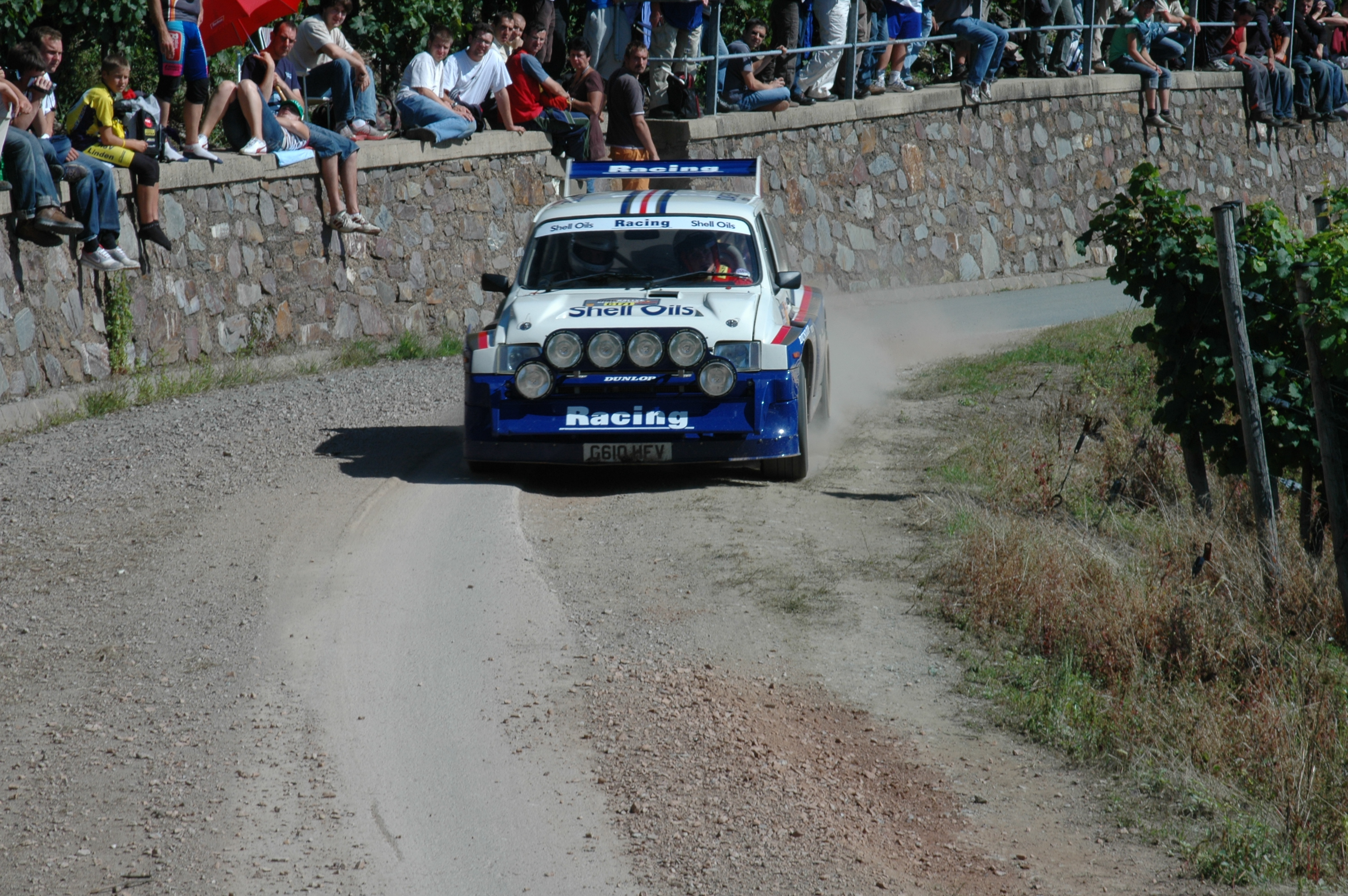 MG Metro 6R4 driven during the 2007 Rallye Deutschland.